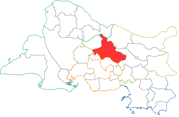 Situation du canton dans le département des Bouches du Rhône (France)